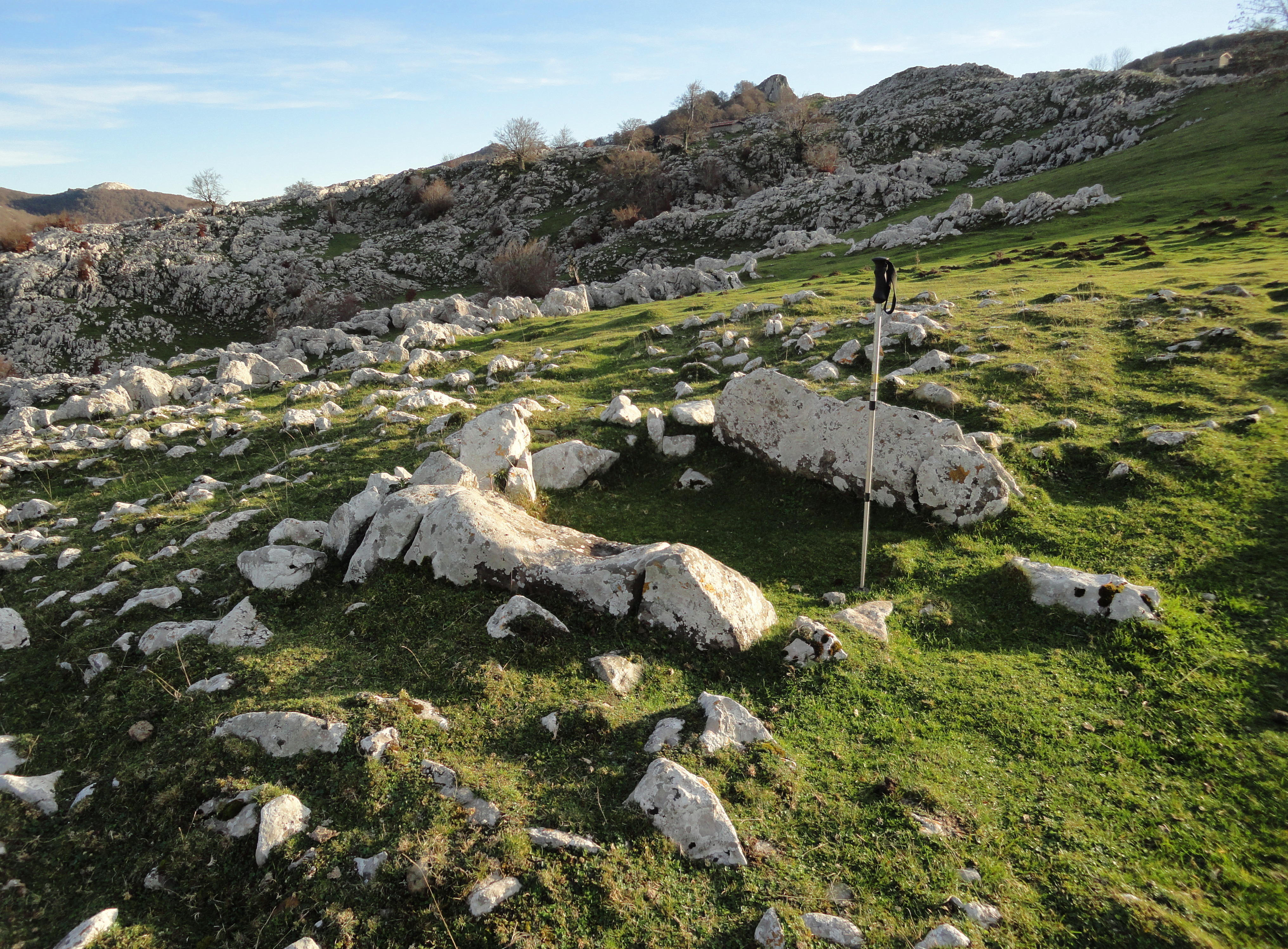 Dolmen Kalparmuñobarrena